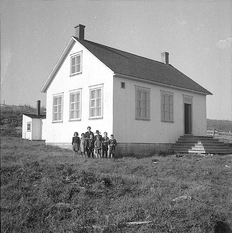 École du rang des Pelletiers à Saint-Pamphile, comté de L'Islet « L'institutrice et ses 7 élèves! Elle avait sa chambre à l'étage, avec un poêle, plus une fournaise à la cave. Ainsi qu'une dépense pour garder son ordinaire et autre choses des plus utile à sa profession d'institutrice! » – Marc Blanchet